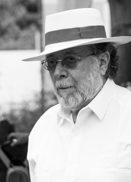 Retrato de Iván Éguez en Febrero de 2016